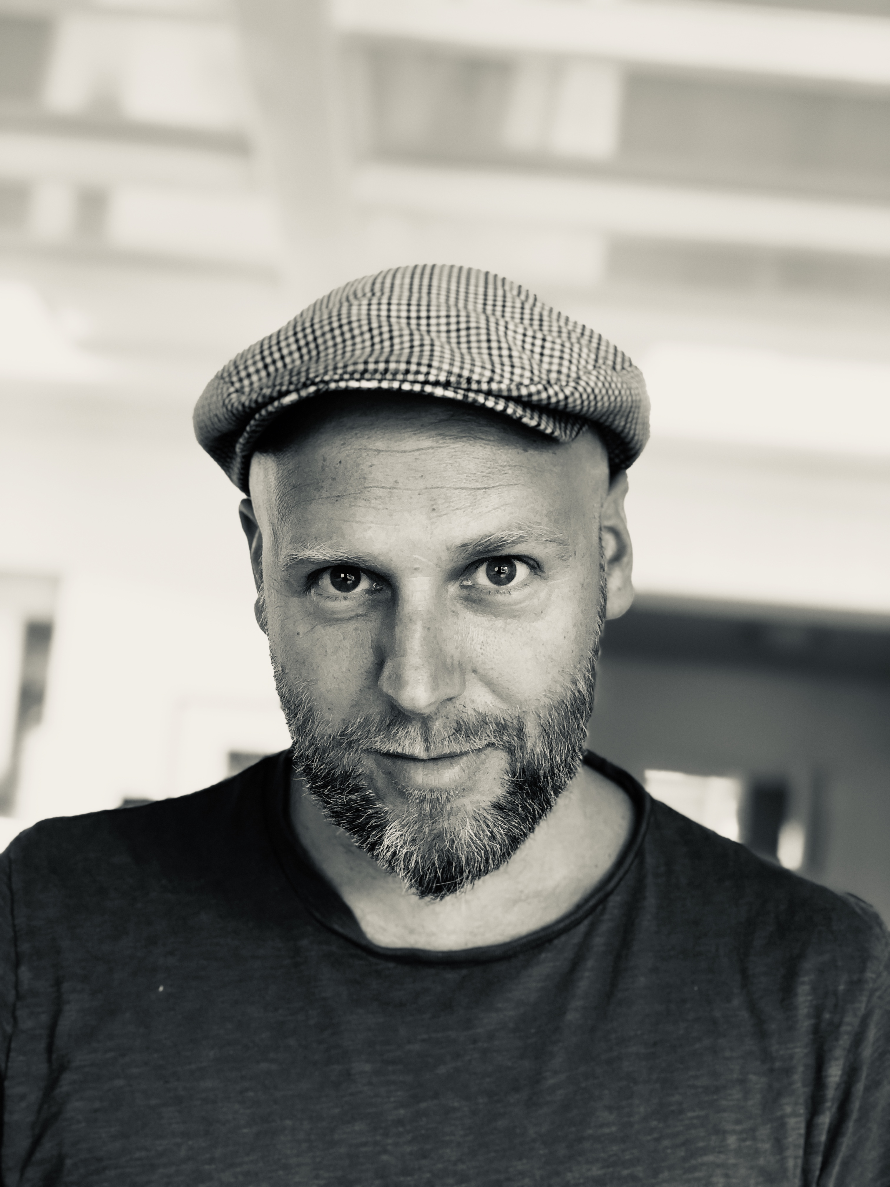 Erik Neimeijer